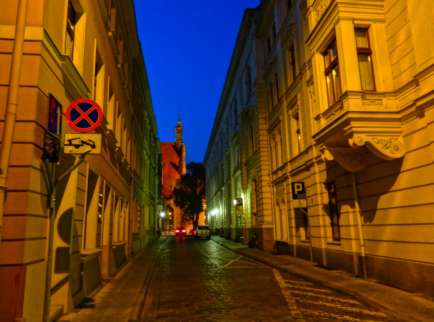 Ulica Jezuicka w Bydgoszczy